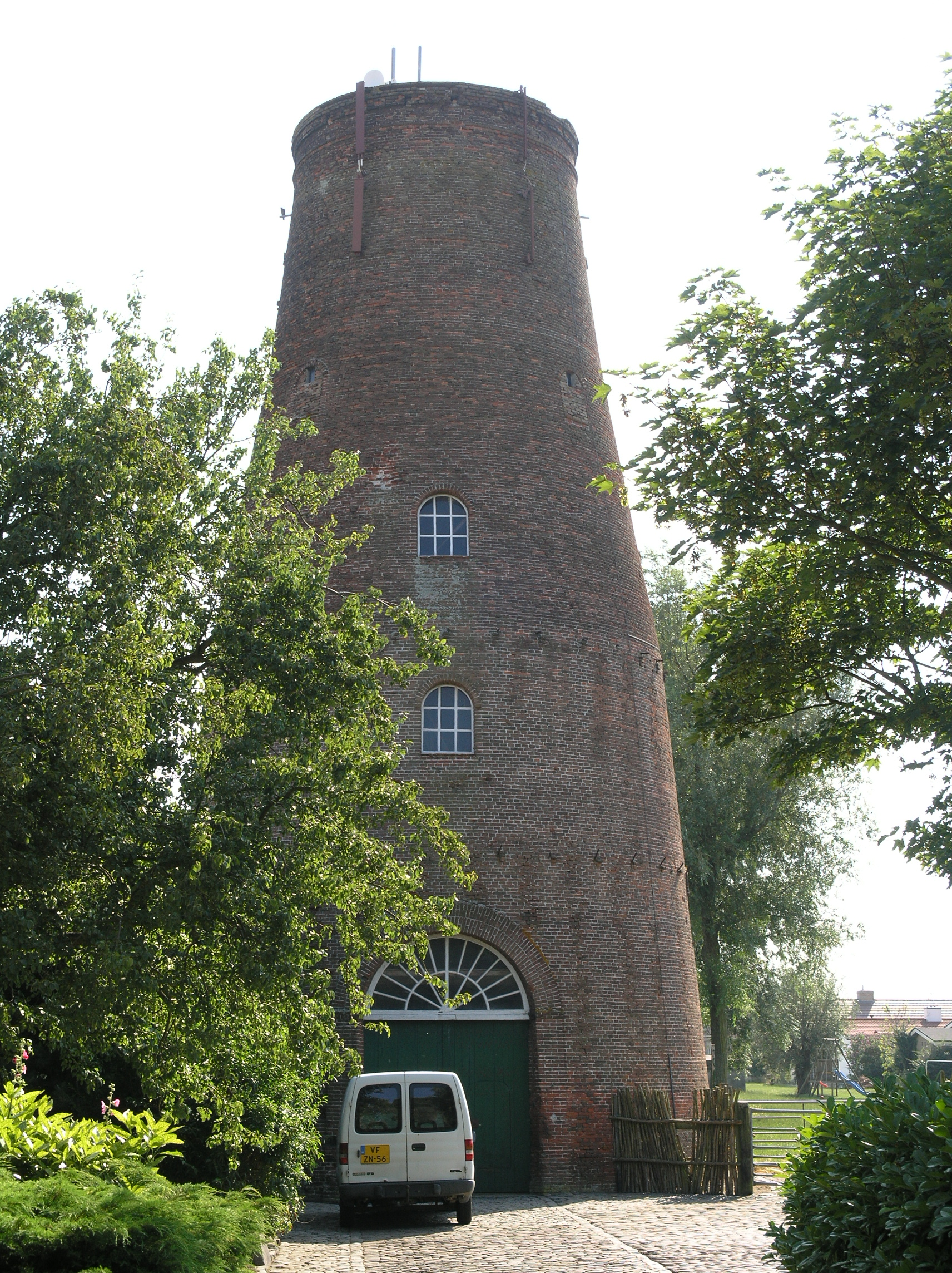 Nieuwvliet Molen Luteyn restant